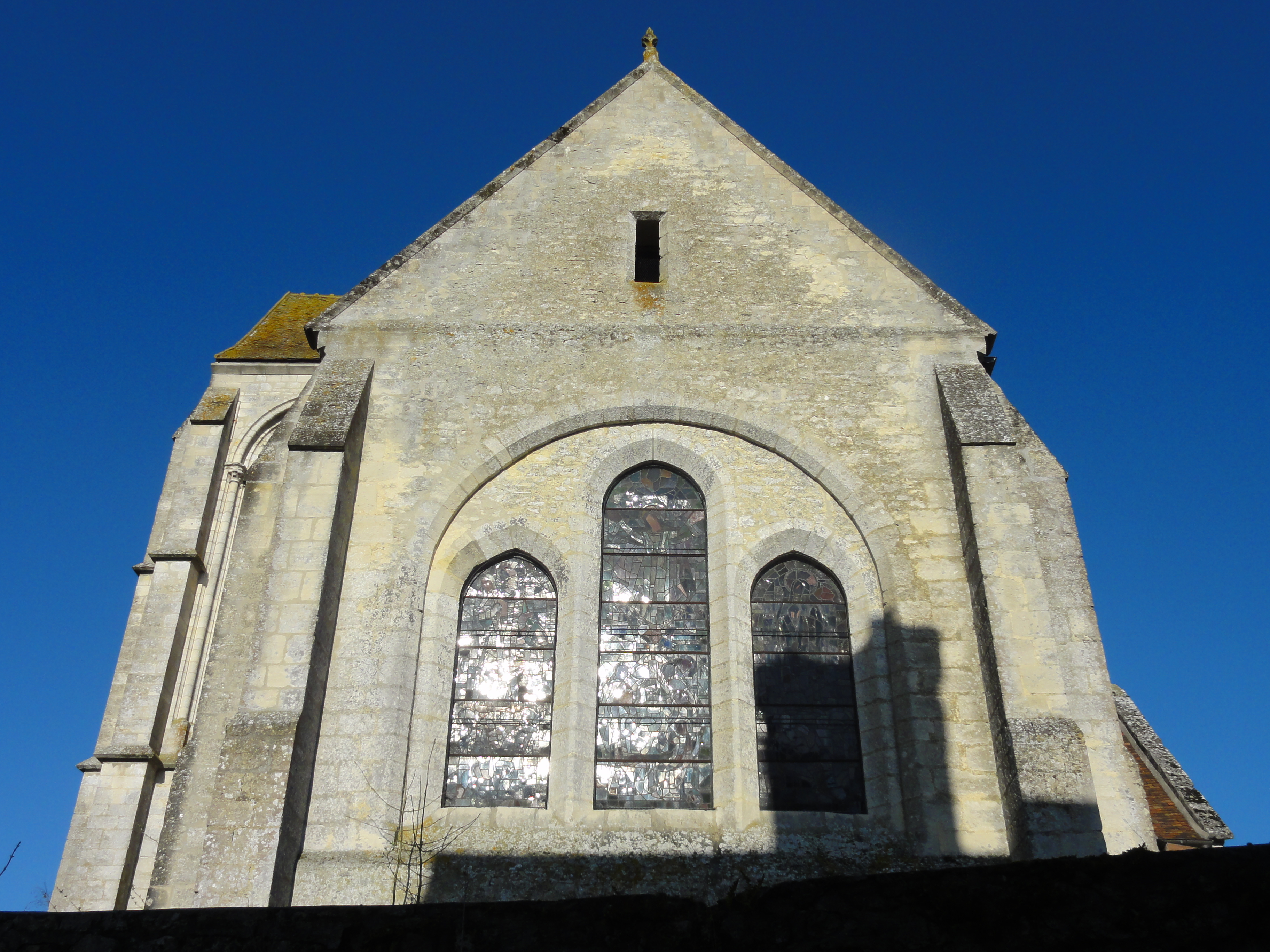 Église Saint-Martin de Borest, chevet.